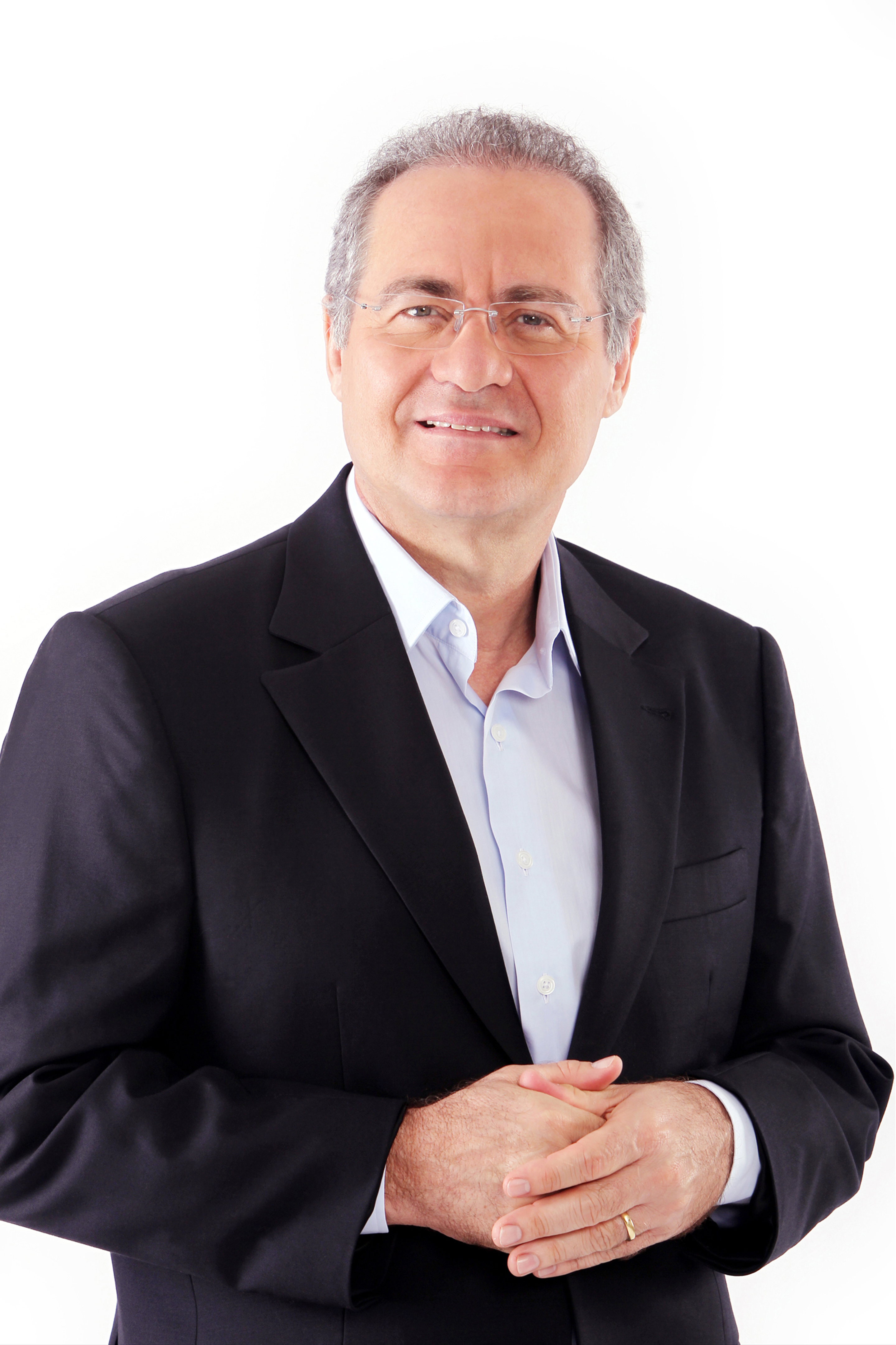 Renan Calheiros, presidente do Senado e senador eleito pelo estado de Alagoas.